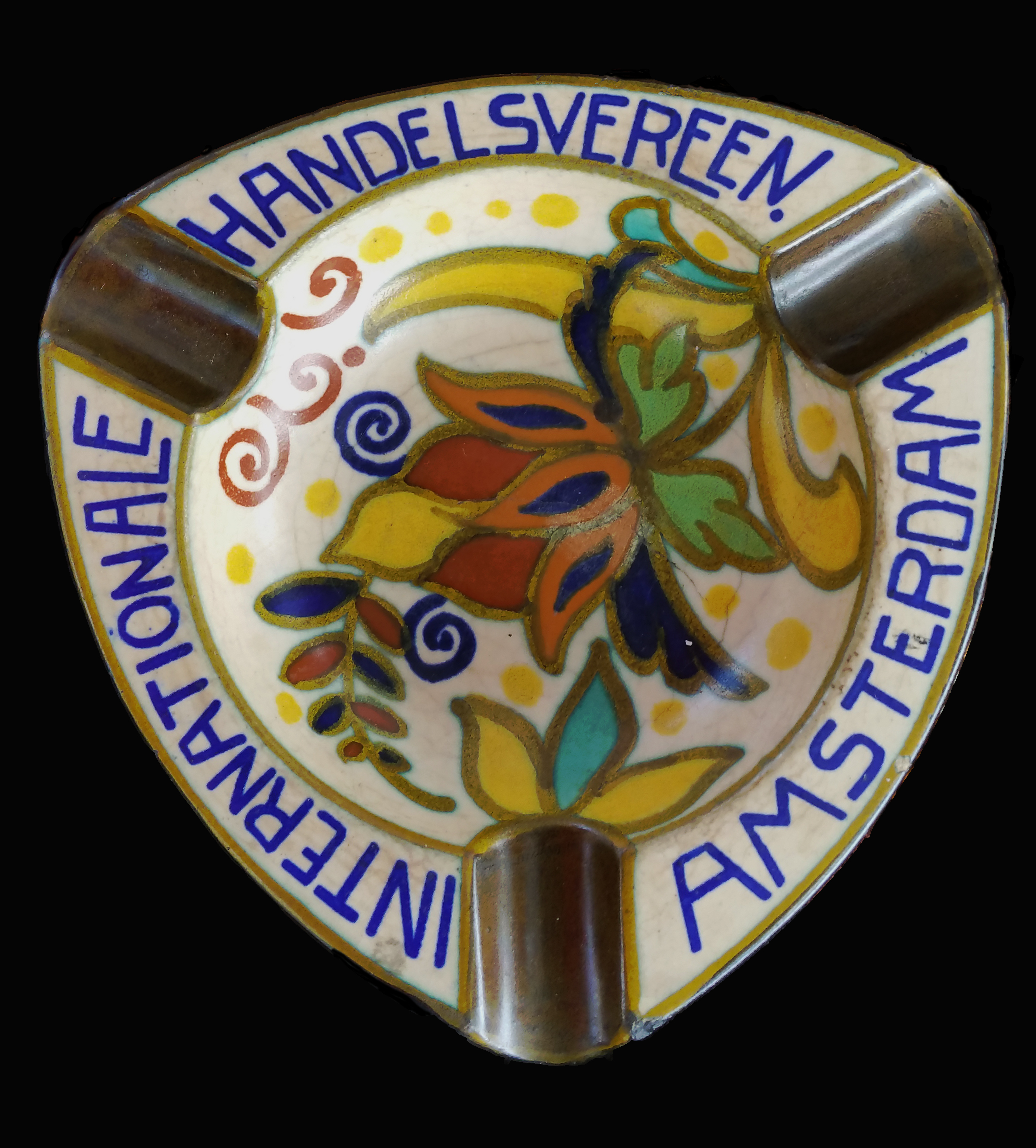 Asbak van Plazuid. Opschrift: Internationale Handelsvereen. Amsterdam